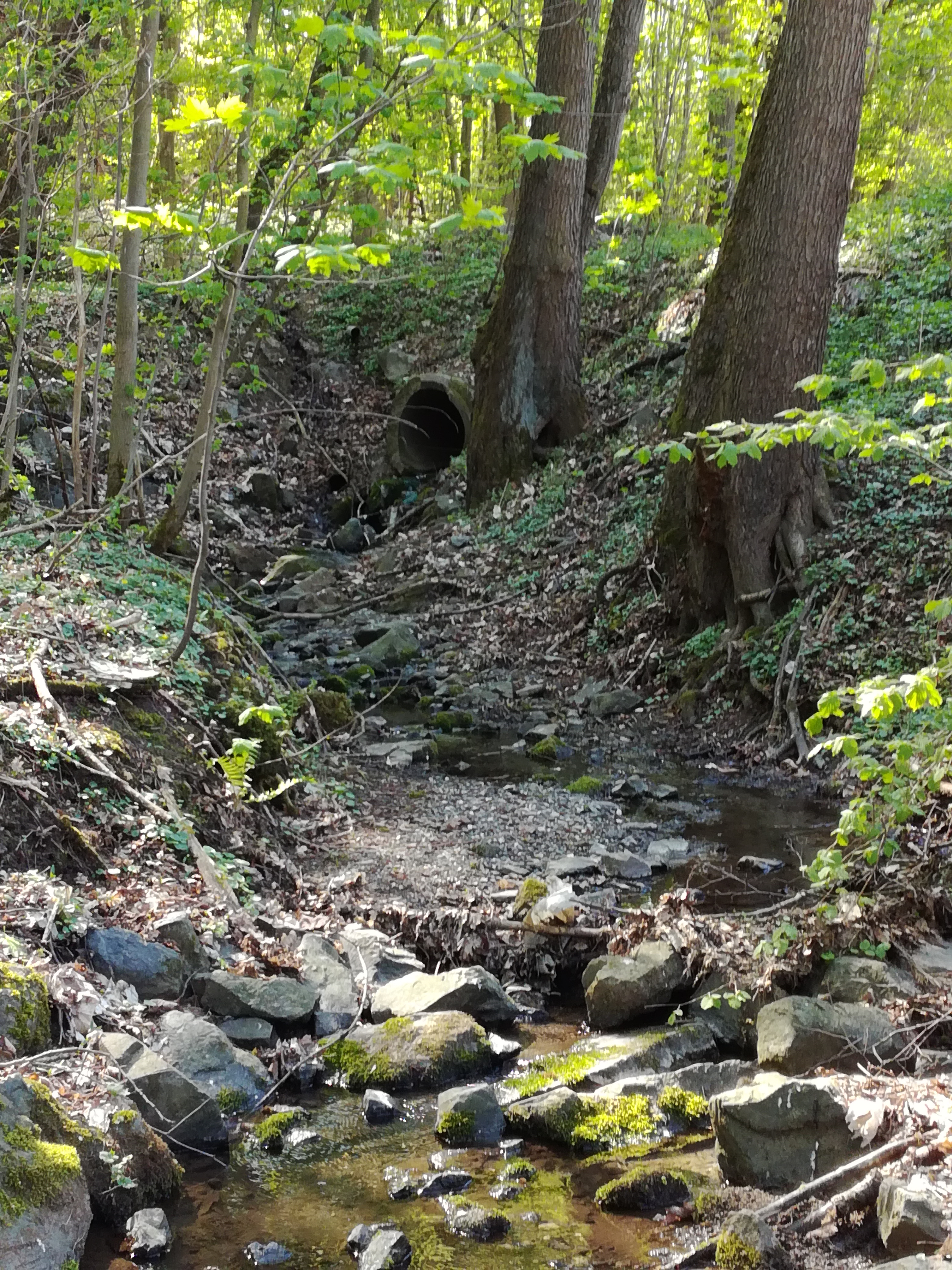 Preuschwitzerin (Zufluss des Roten Mains)